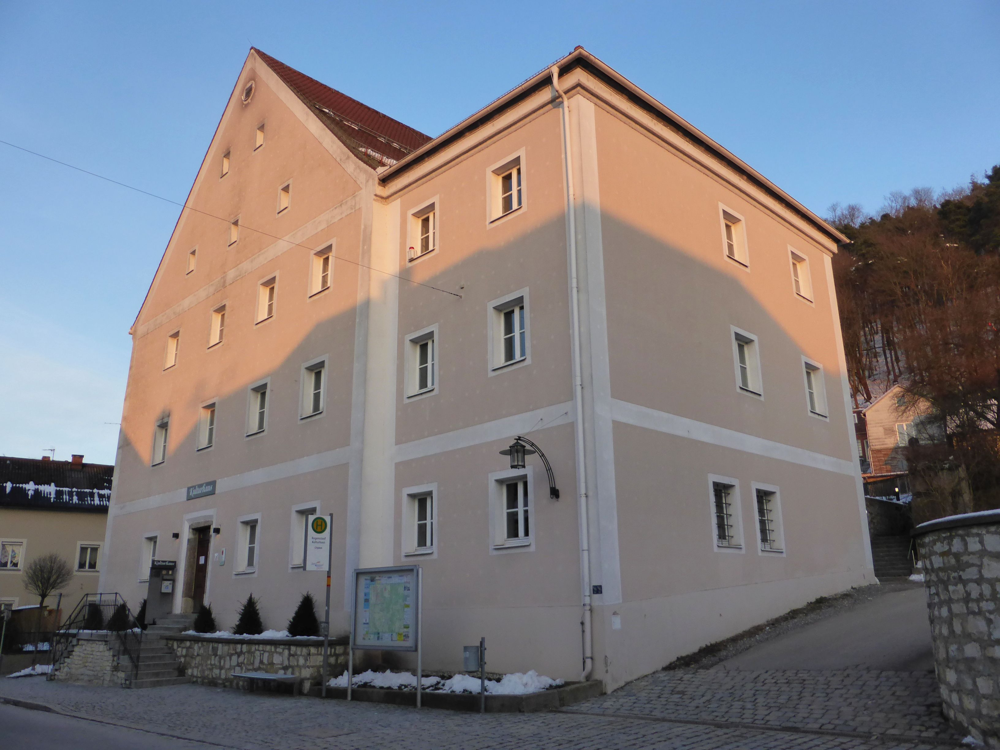 Regenstauf (Hauptstraße 34